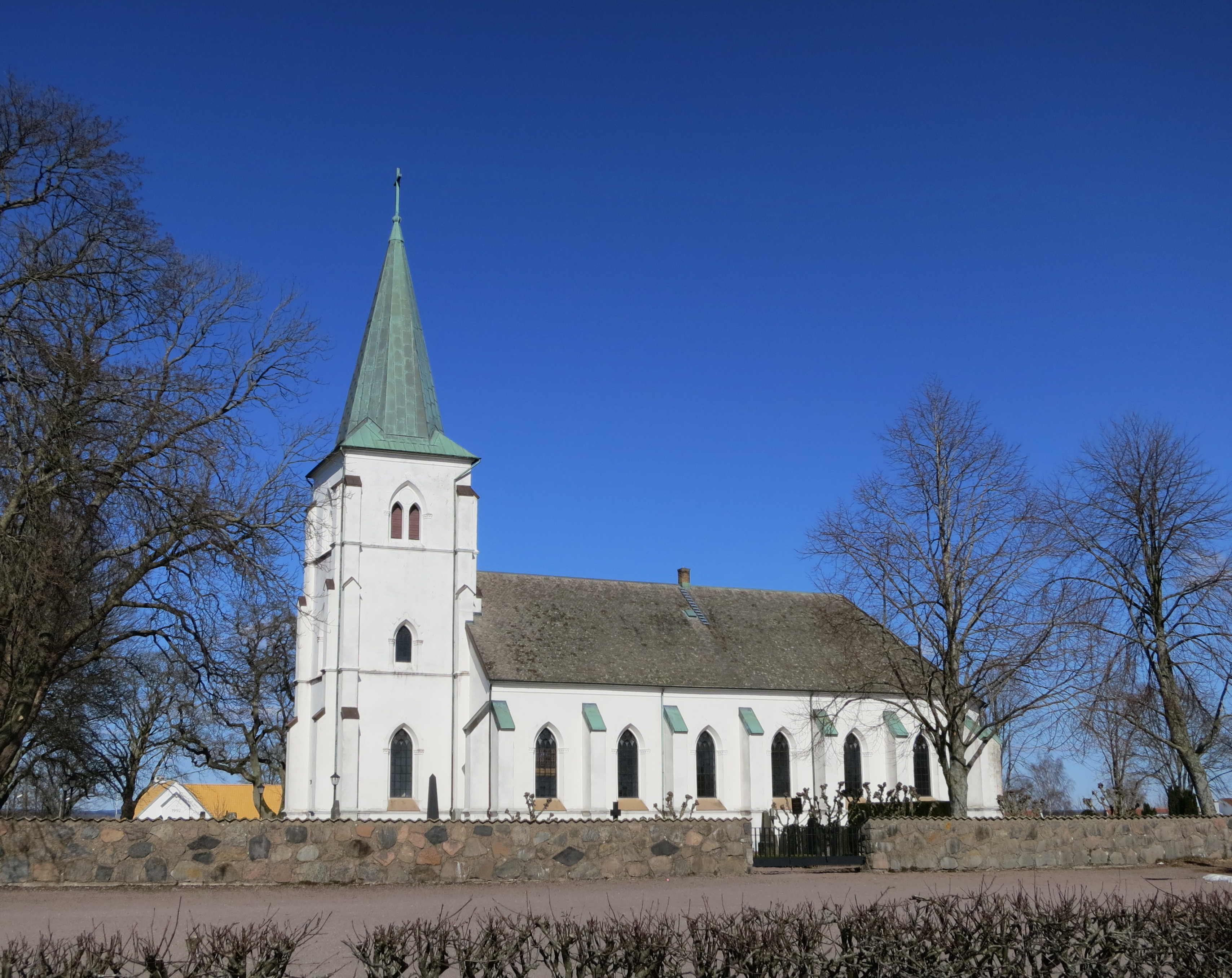 Höja kyrka i Ängelholms kommun